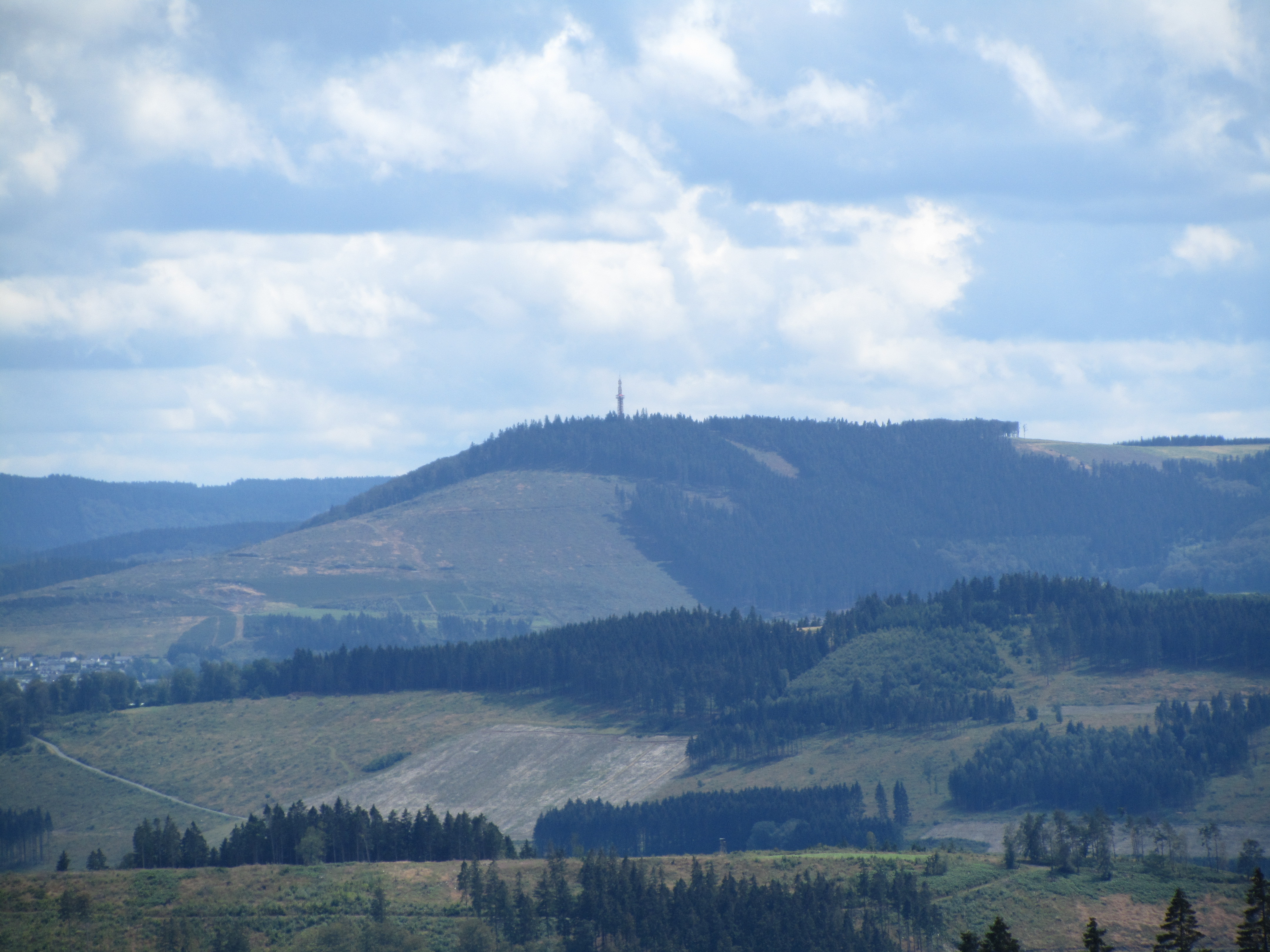 Blick vom Lörmecketurm nach Südosten zum Berg Stüppel (732 m) mit dem 57 m hohen Stüppelturm